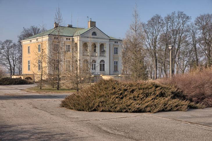 Piotrkowice dwór Rutkowskich